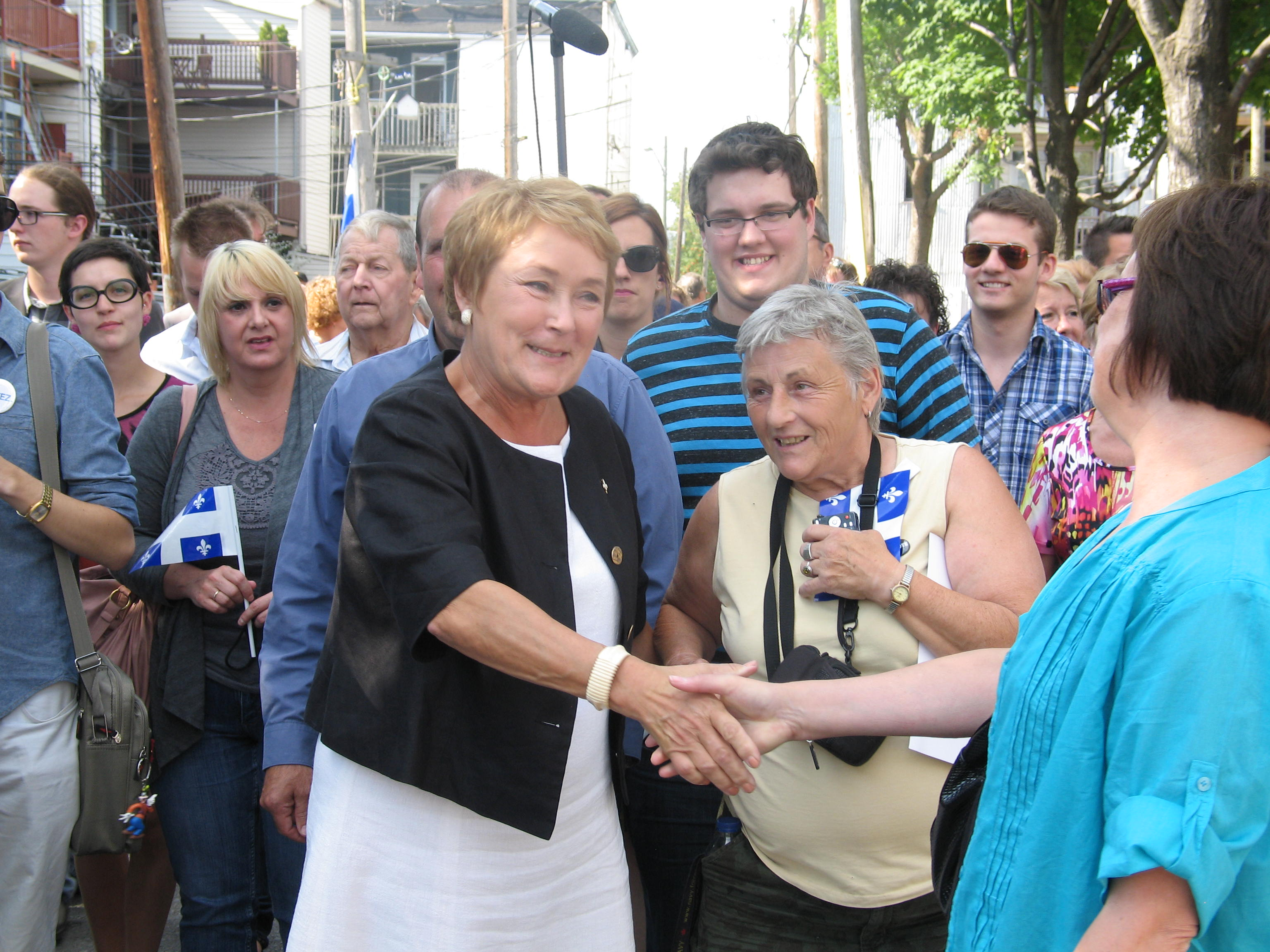 Pauline Marois participe à un événement partisan dans le quartier Limoilou de Québec à la veille de l'élection générale québécoise de 2012.